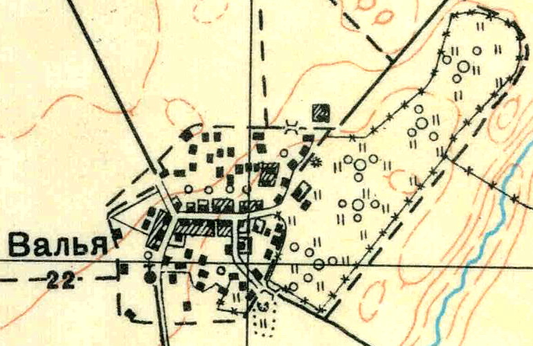 Топографическая карта Ленинградской области, квадрат О-35-22-Г-а (Керстово), деревня Валья.